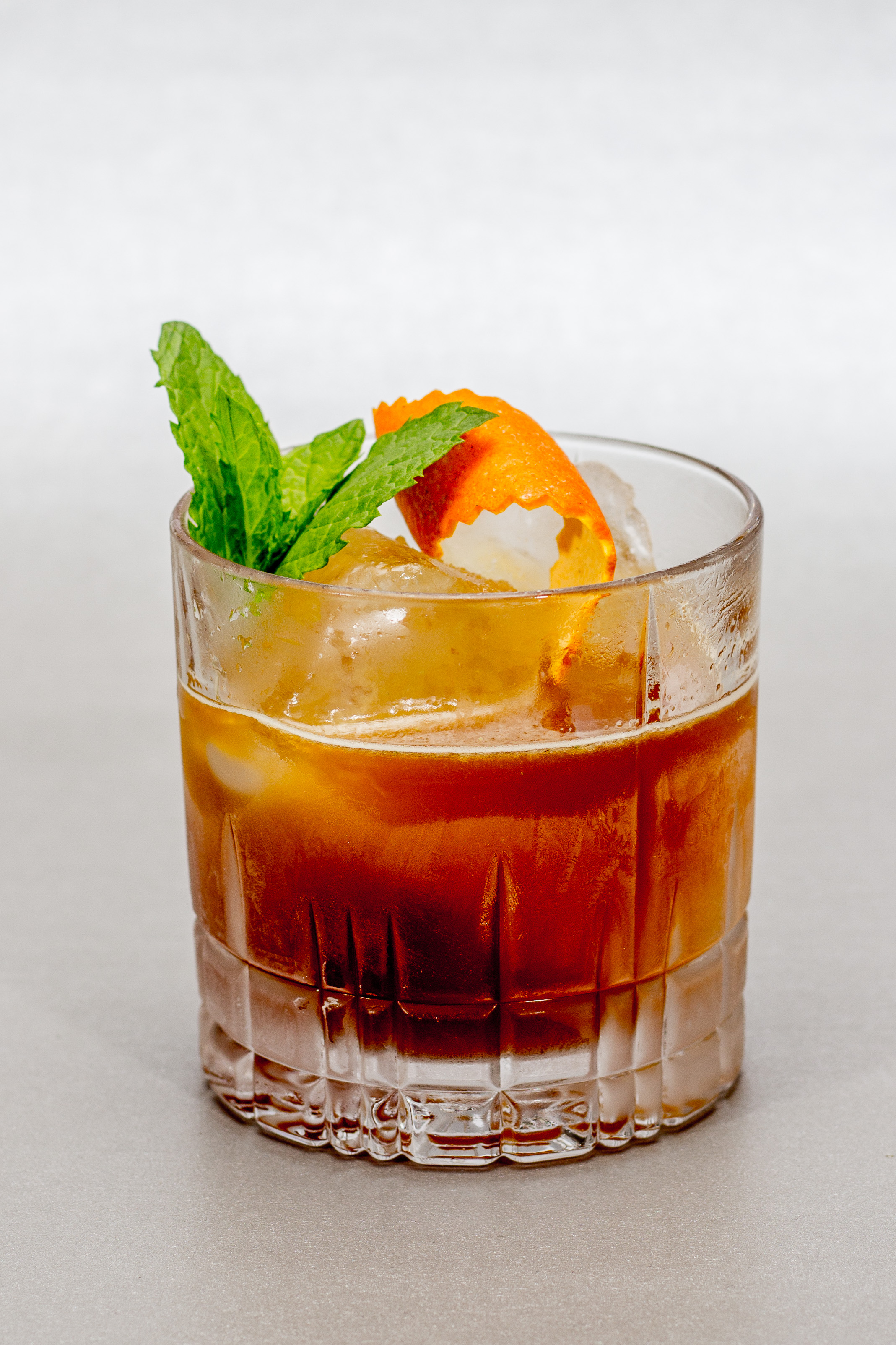 Antica Torino Smash